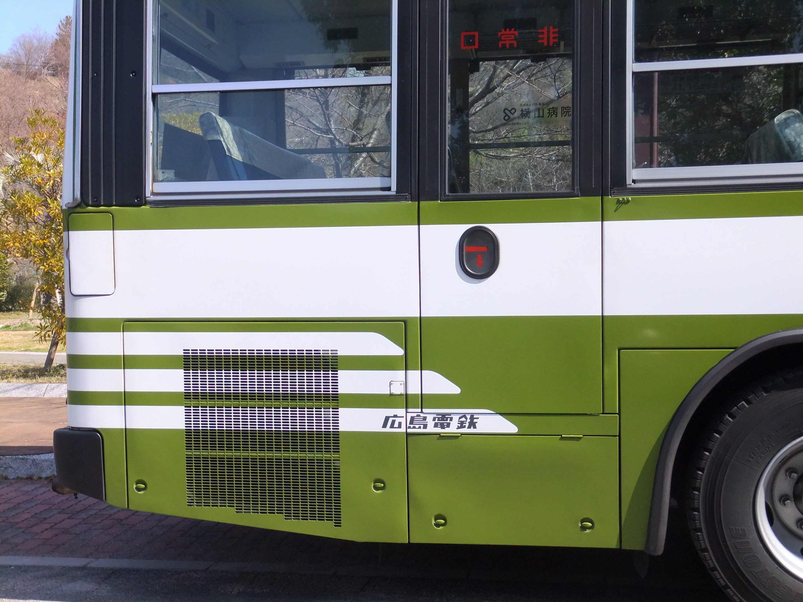 広島電鉄バス 99657